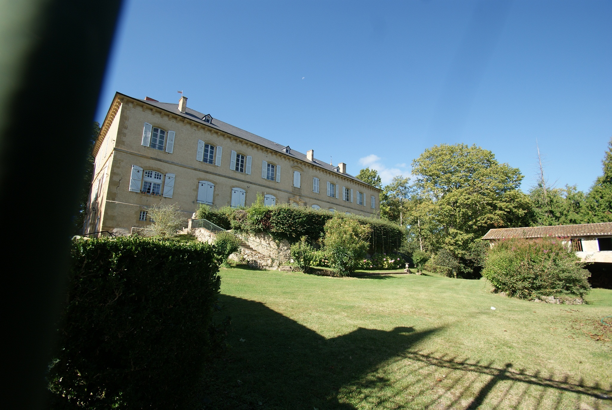 Het kasteel van Péguilhan; Chateau de Villeneuve.